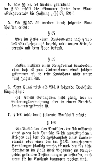 Militär-Strafgesetzbuch von 1934, Paragraph 57, 59 und 160.